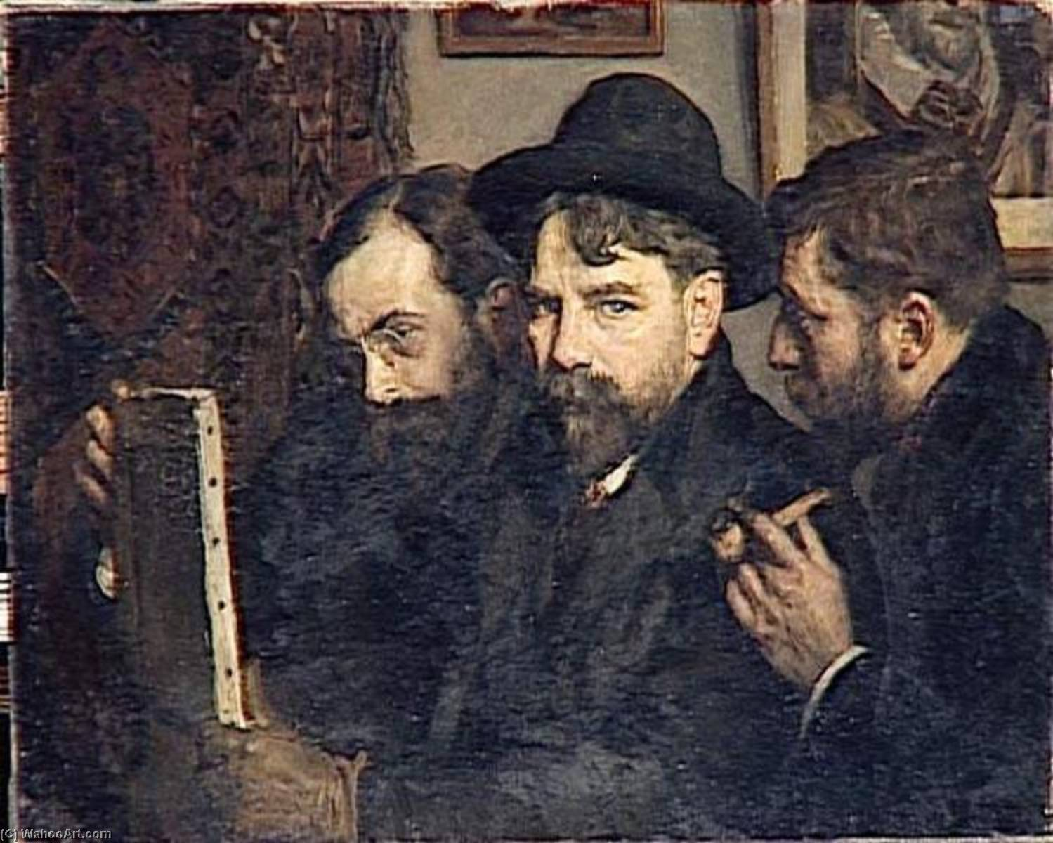 Groupe d'amis , dit aussi les trois amis